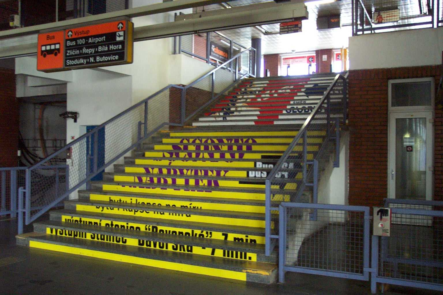 Metro station Zličín, Prague. Stanice metra Zličín v Praze.